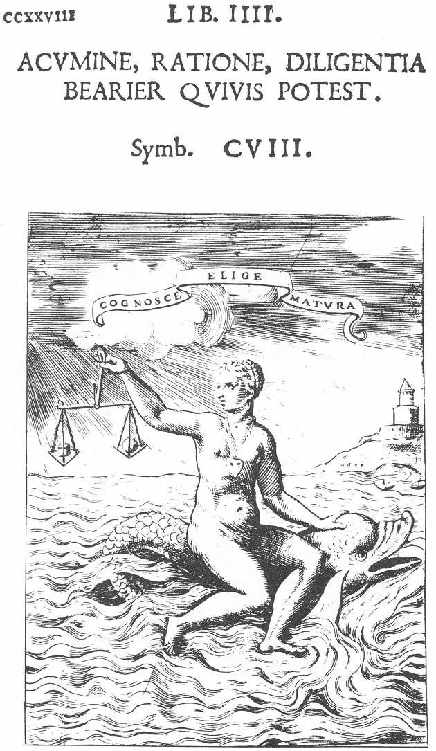 La Prudenza, incisione, in "Symbolicarum quaestionum de universo genere" di Achille Bocchi, Bononiae 1555